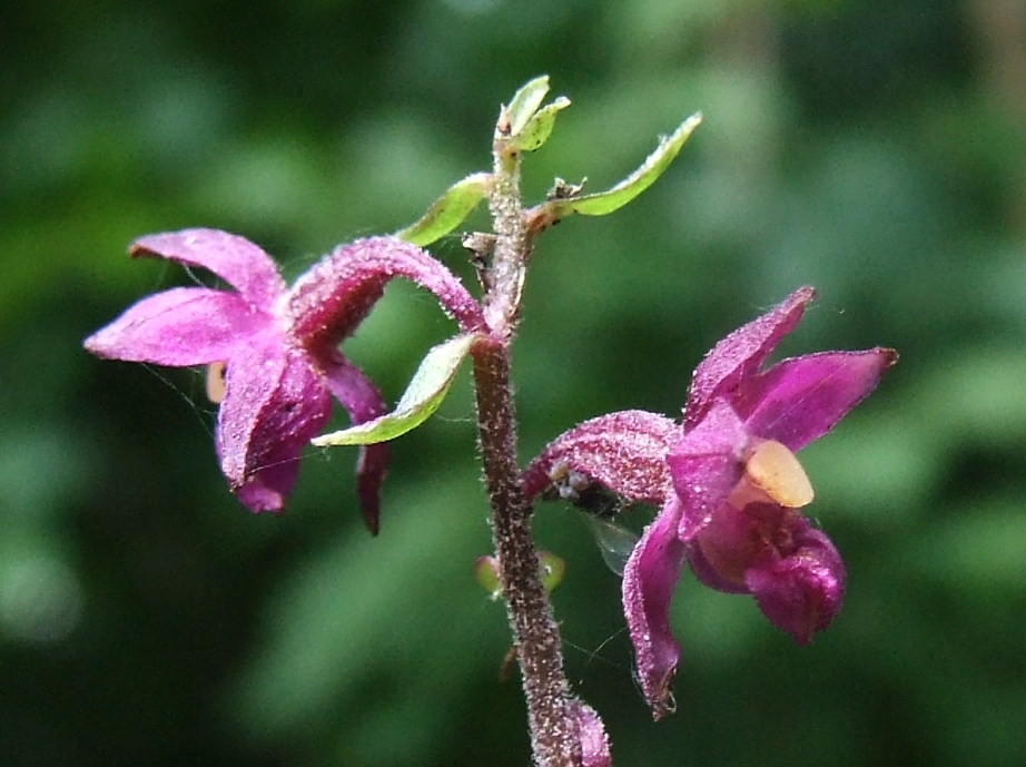 Epipactis atrorubens (pl. kruszczyk rdzawoczerwony)